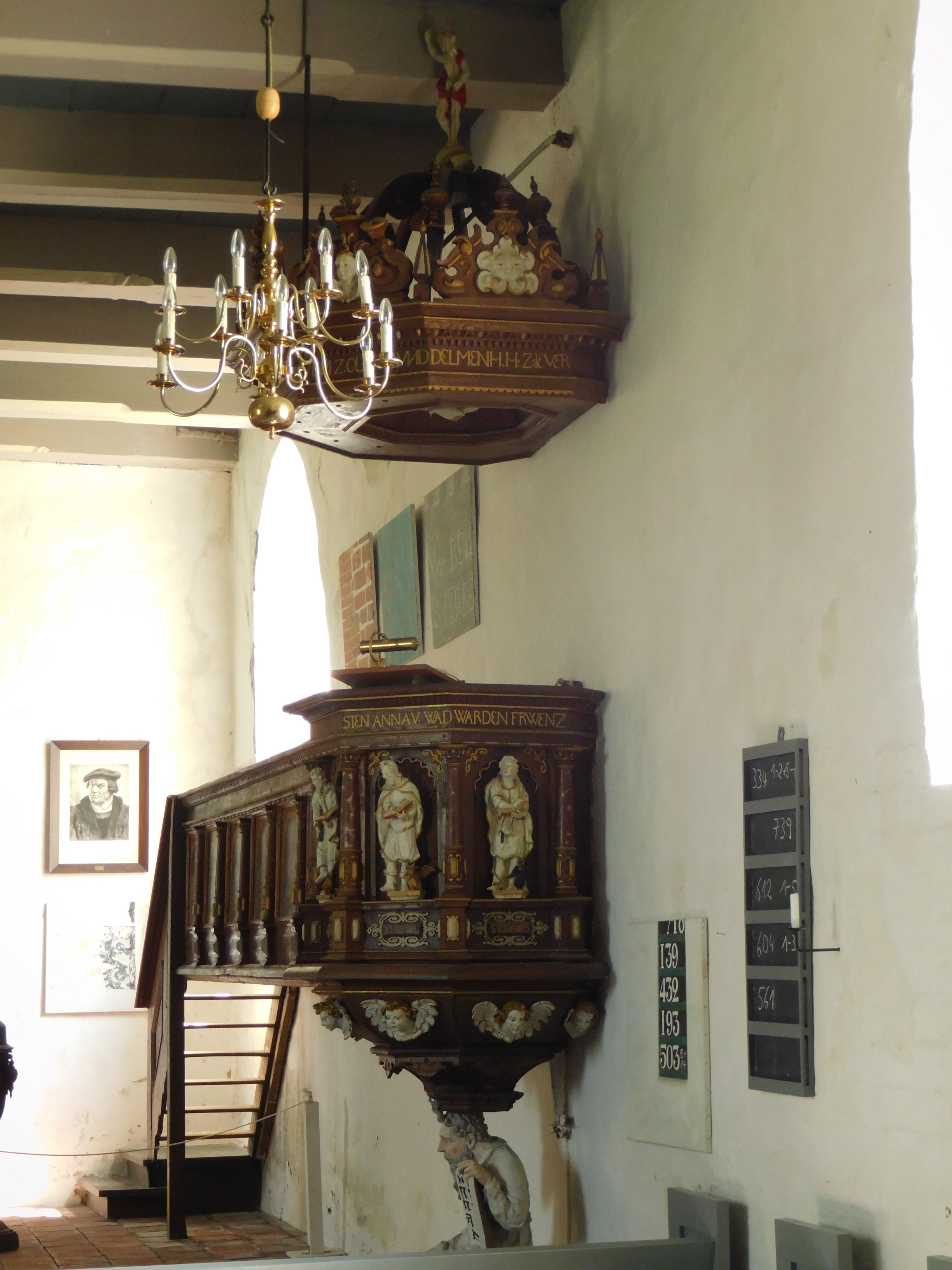 Kanzel der evangelisch-lutherischen Kirche Wüppels